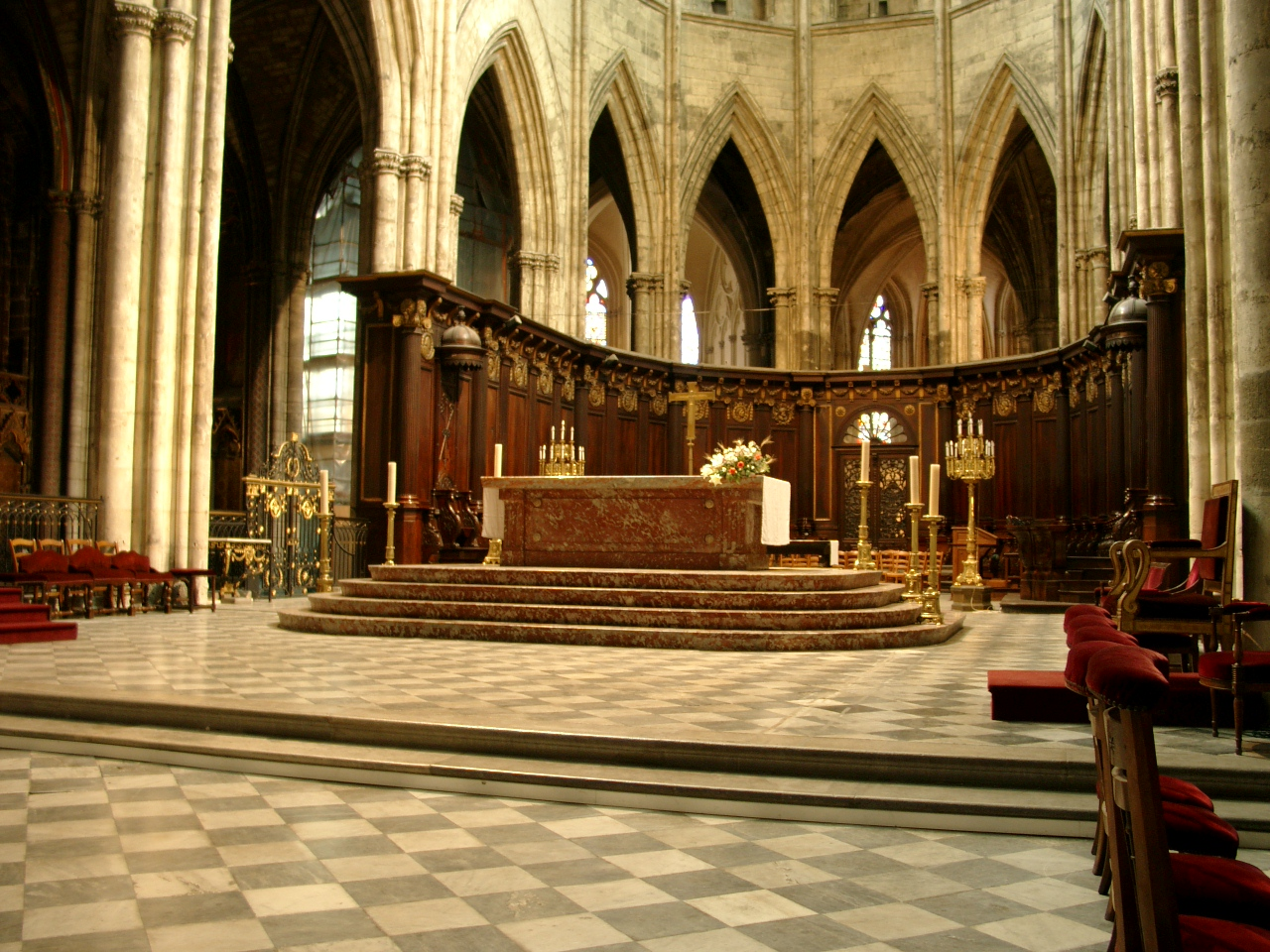 Choeur de la cathédrale St André - Bordeaux (33 - France)